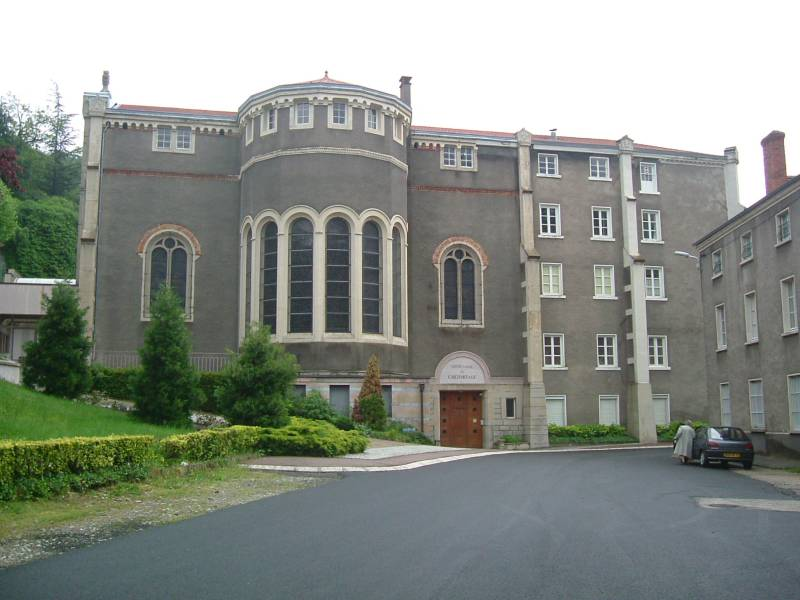 Hermitage de Notre-Dame a Saint-Chamond, amb l'absis dedicat a Sant Marcel·lí Champagnat. És la casa mare dels Germans Maristes.